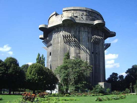 Gefechtsturm Augarten. Der runde Flakturm (Gefechtsturm) im Wiener Augarten. Dies ist der mächtigere der beiden Flaktürme im Augarten, er befindet sich direkt im „Parterre“, dem vorderen Bereich des Augartens. Dieser Flakturm bietet aufgrund der reichlich vorhandenen Öffnungen vielen Vogelarten Unterschlupf und Nistmöglichkeiten. Die Beschädigungen am Turm entstanden weder durch die Bombardements im zweiten Weltkrieg, noch durch gescheiterte Sprengungsversuche nach dem Krieg (wie selbst mancher Wiener denkt), sondern durch die Explosion von schätzungsweise 2000 Stück im Turm gelagerter 12,8cm-Granaten, welche im Jahr 1946 durch dort spielende Kinder ausgelöst wurde.